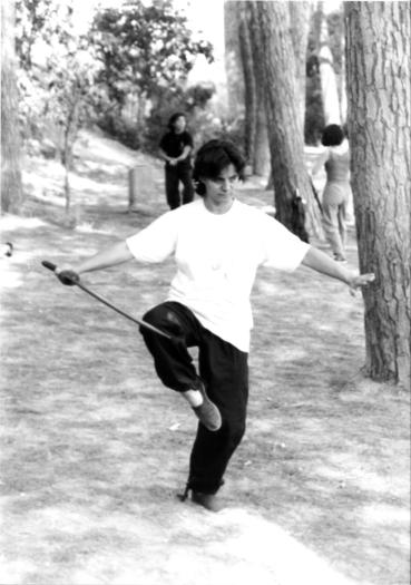 Taiji Dao